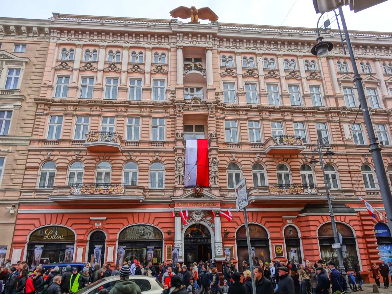 Hotel Pod Orłem w Bydgoszczy przy ul. Gdańskiej 14 (zbud. 1896, Józef Święcicki)